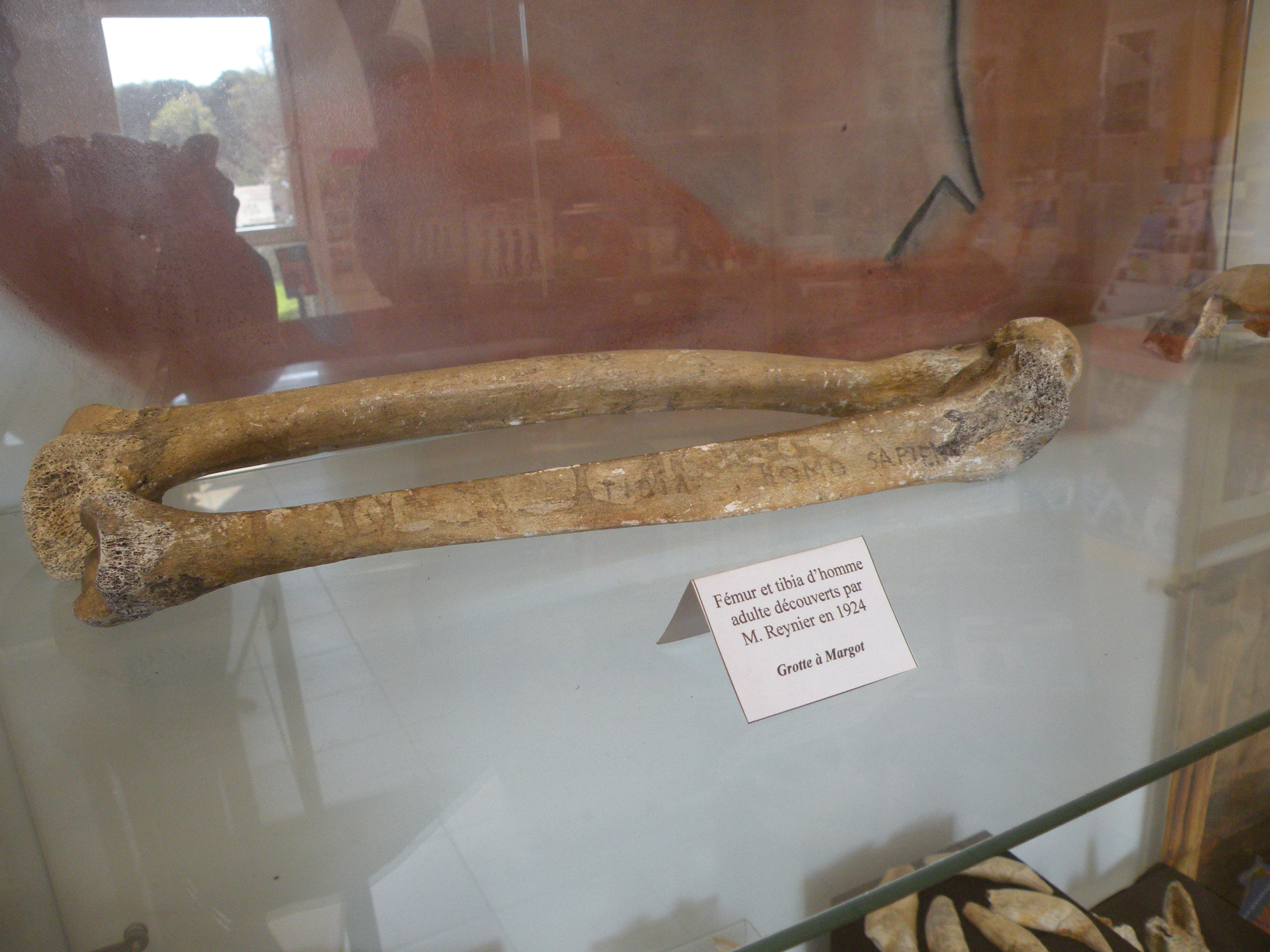 vu sur le domaine des Grottes et Canyon de Saulges femur trouver dans la grotte margot